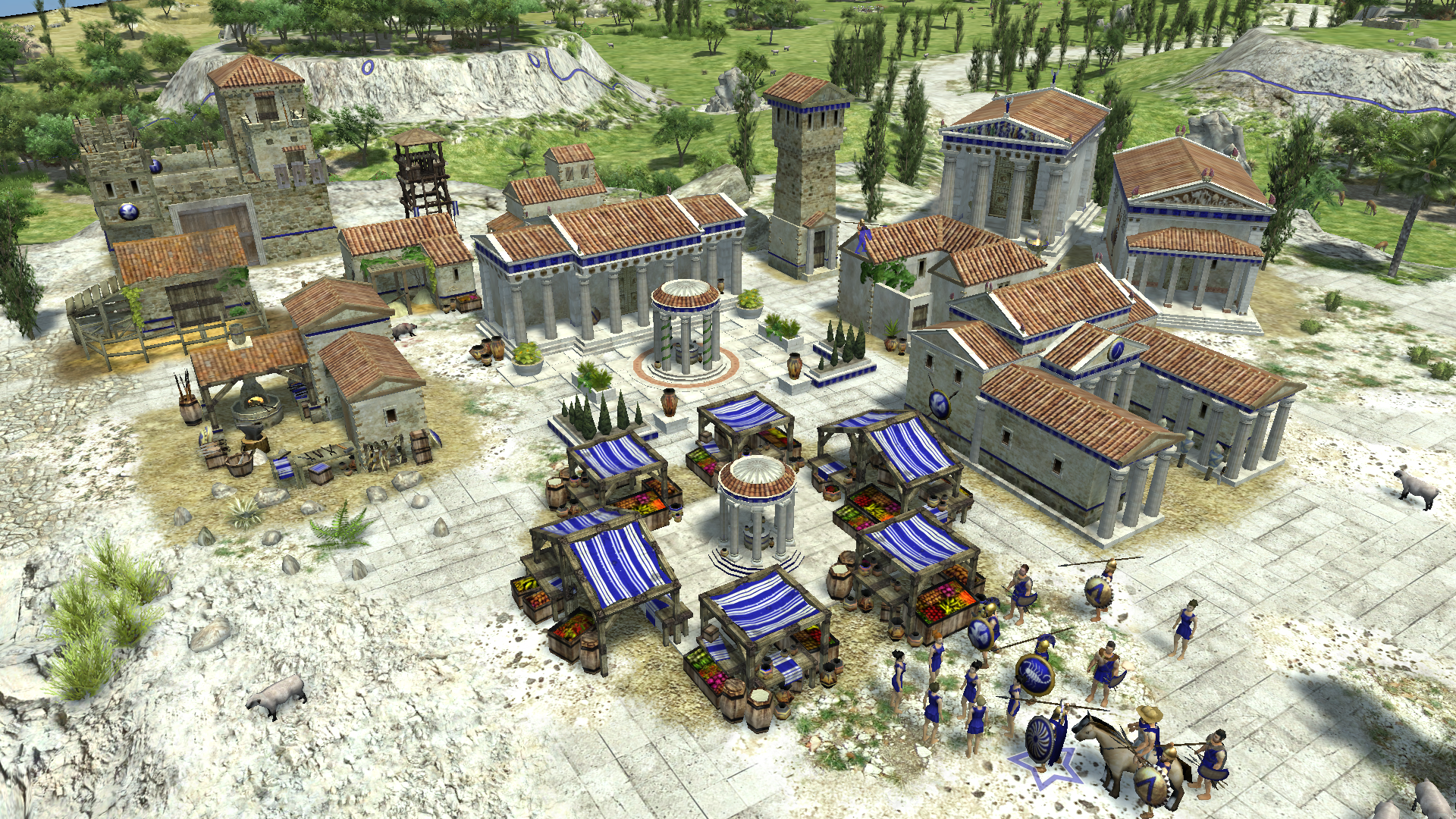 0 A.D. Spartaner